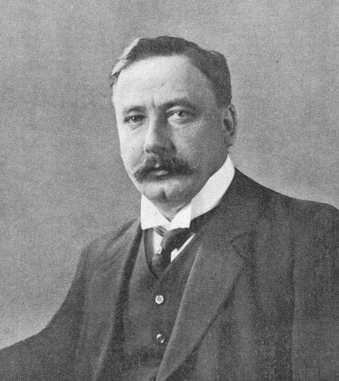 John Hammar (1869-1923) på omslaget av Hvar 8 Dag 1908